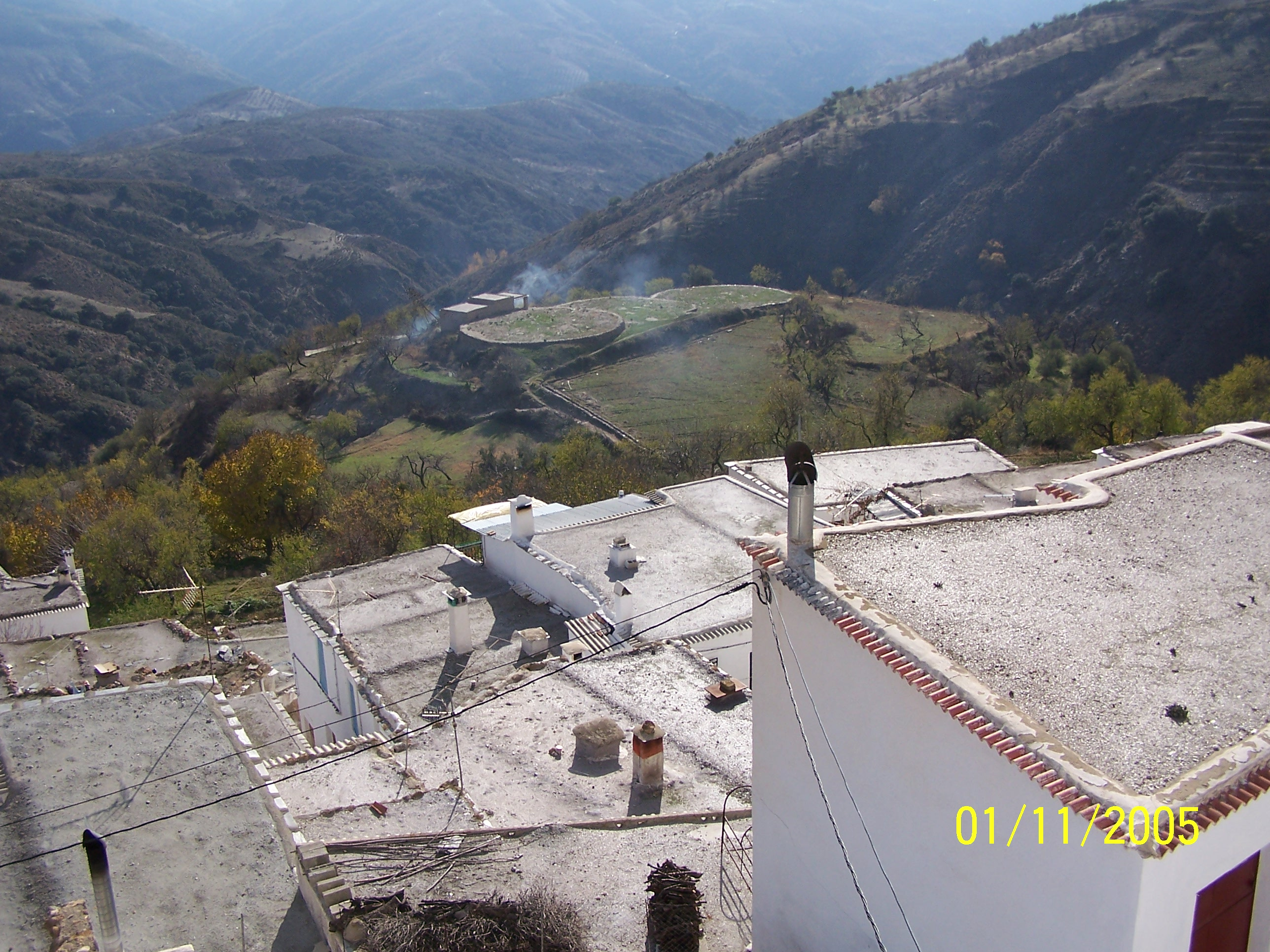 Vista de las cubiertas de launa en Nieles (Alpujarra)